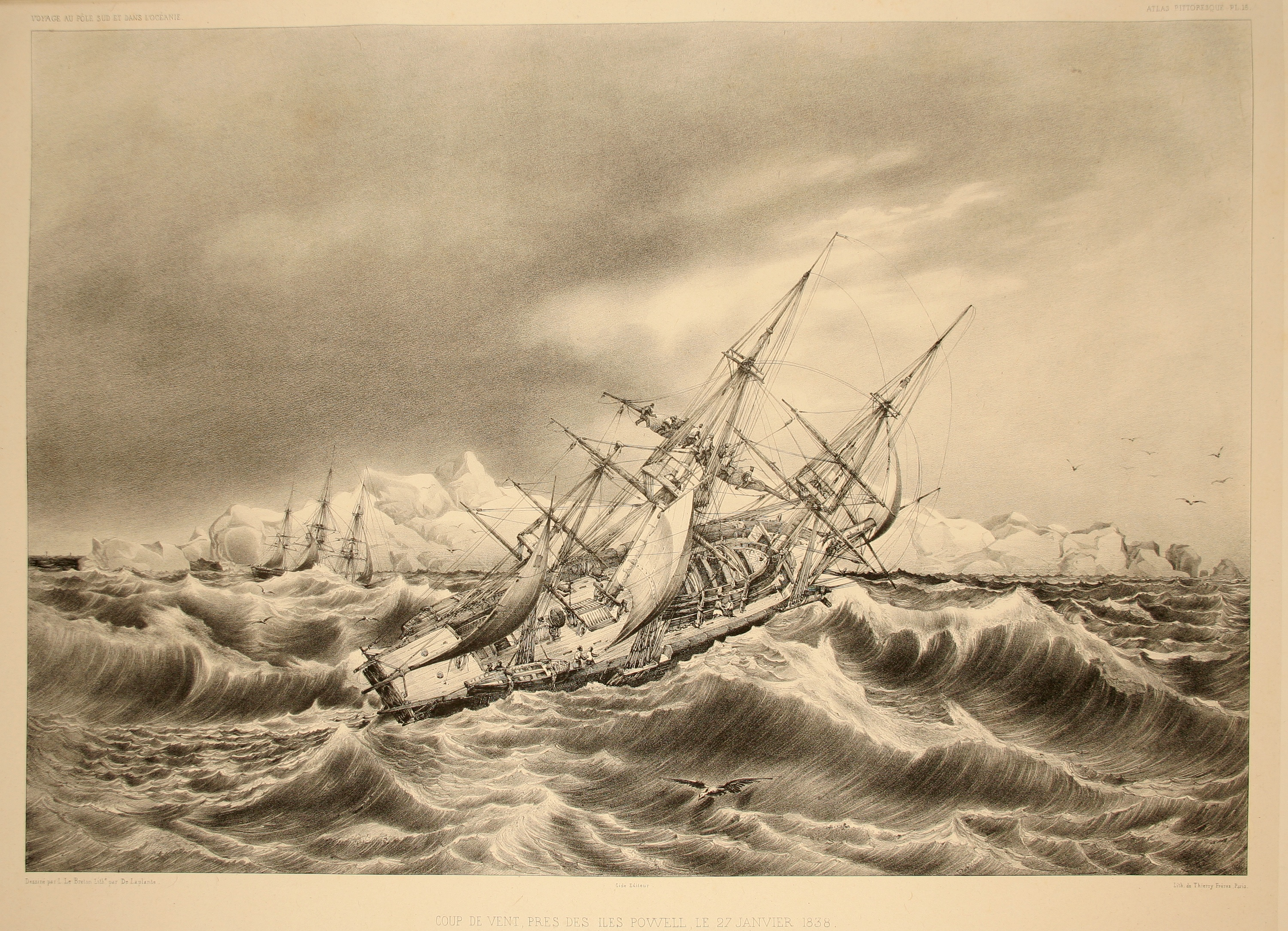 Coup de vent près des îles powell le 27 janvier 1838. Atlas pittoresque, planche 16